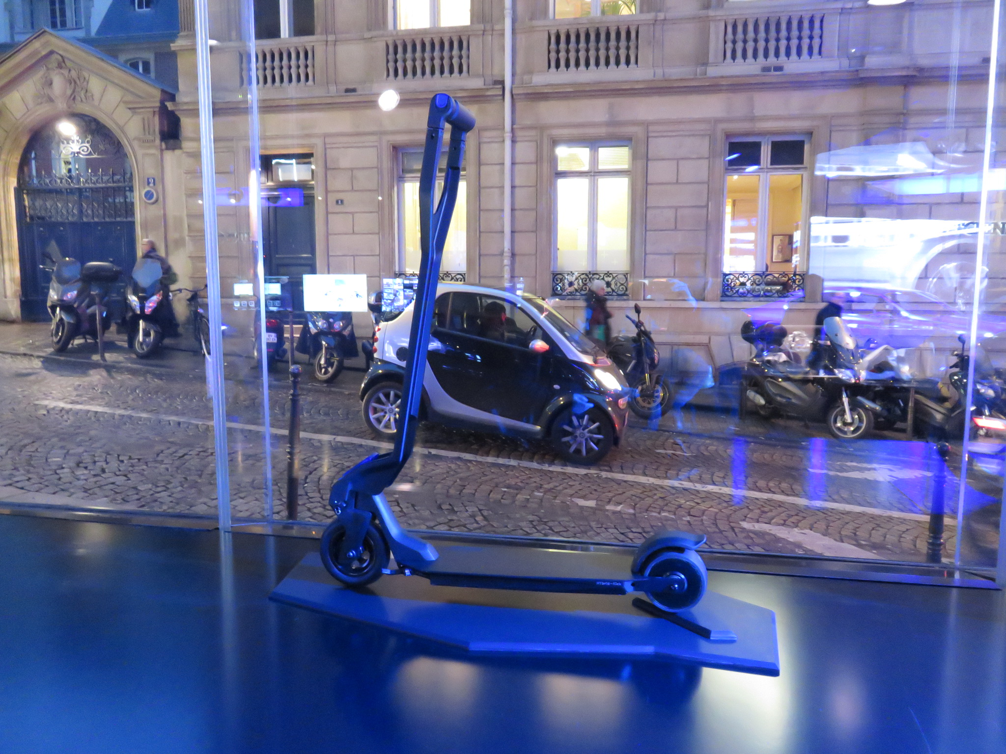 Peugeot HYbrid-kick : trottinette électrique HYbryd intégrée au concept car Peugeot Exalt 2014, showroom Peugeot Champs Elysée Noel 2014